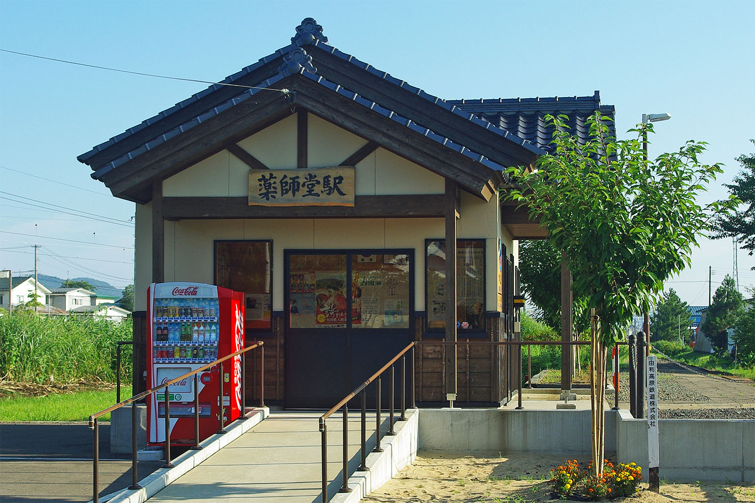 由利高原鉄道 薬師堂駅